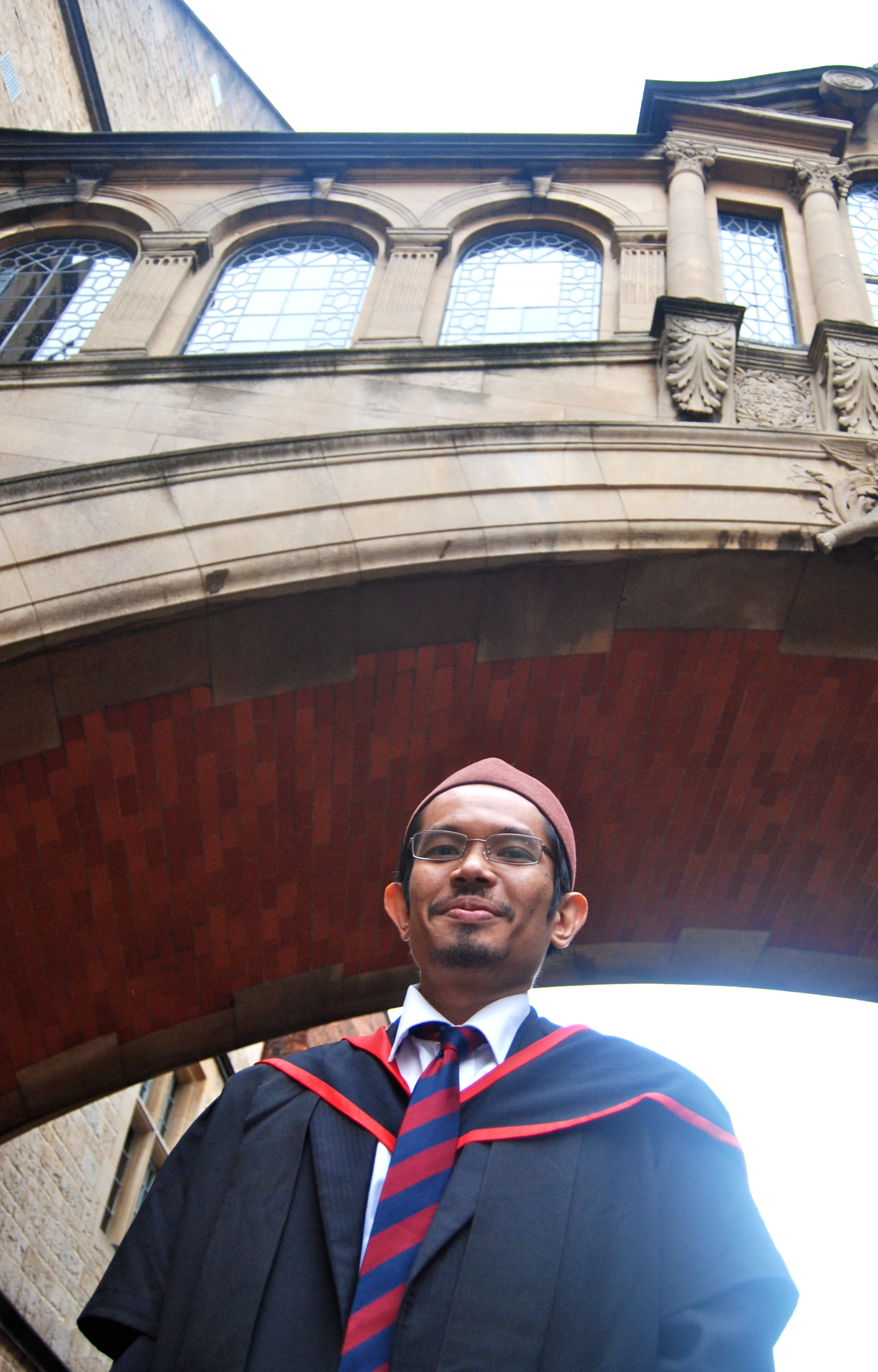 afifialakiti